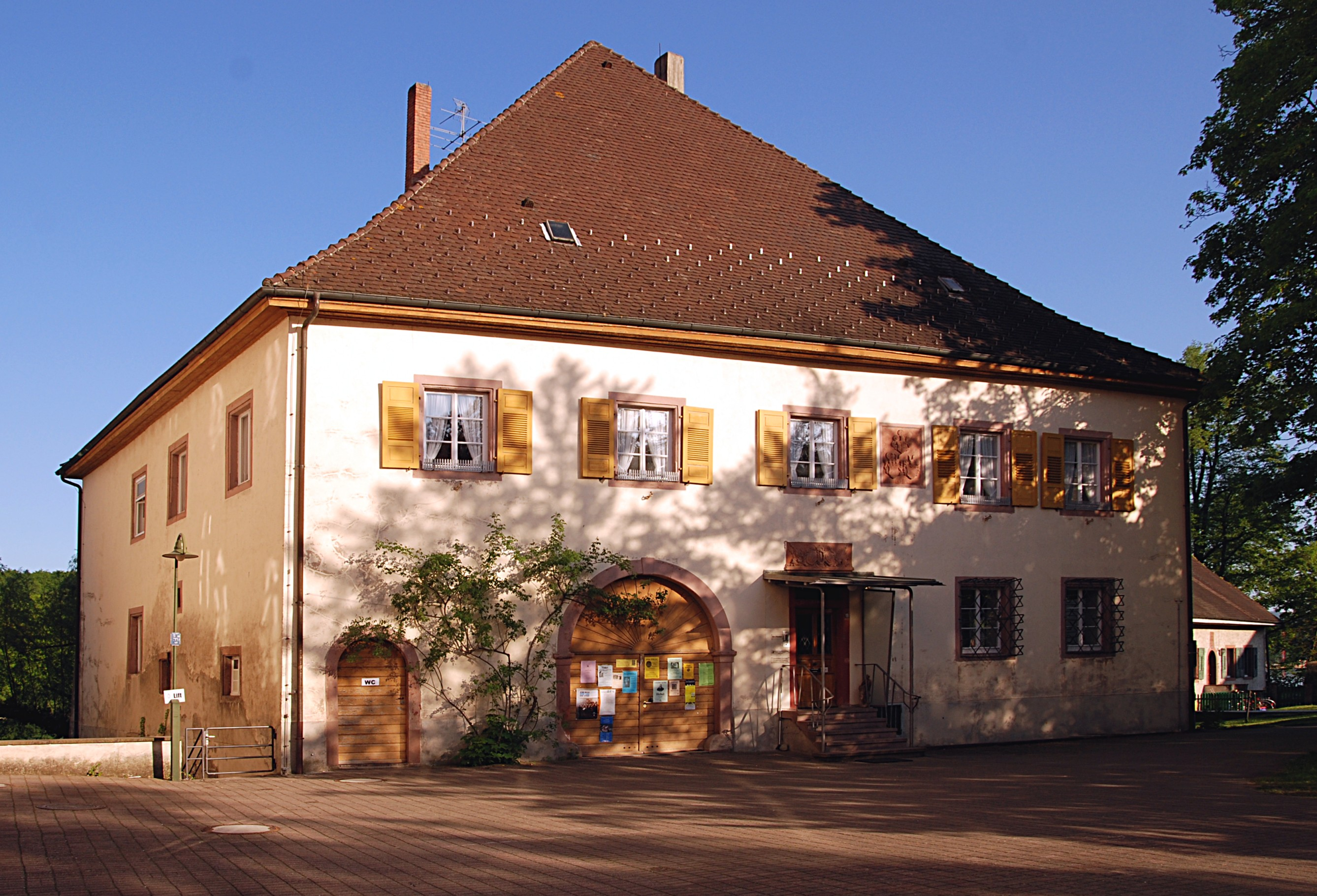 Schloss Beuggen: Firmarie (oder Pfarrhaus)